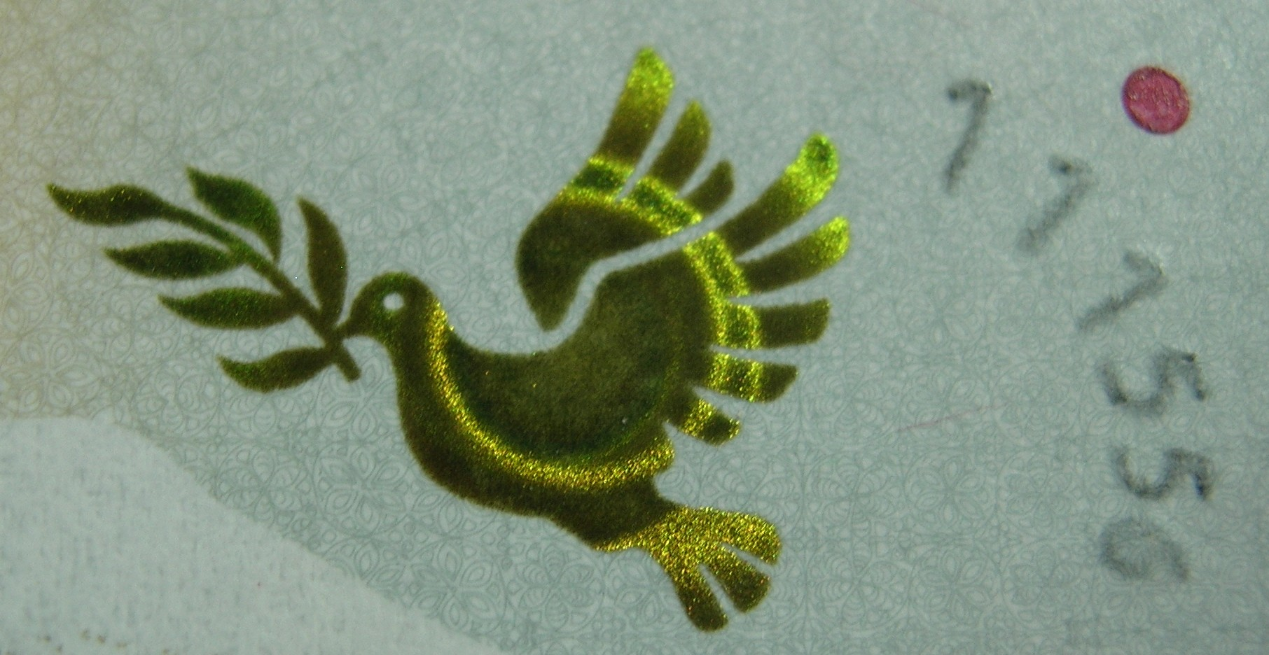 polygram na bankovce Armenie (2018)